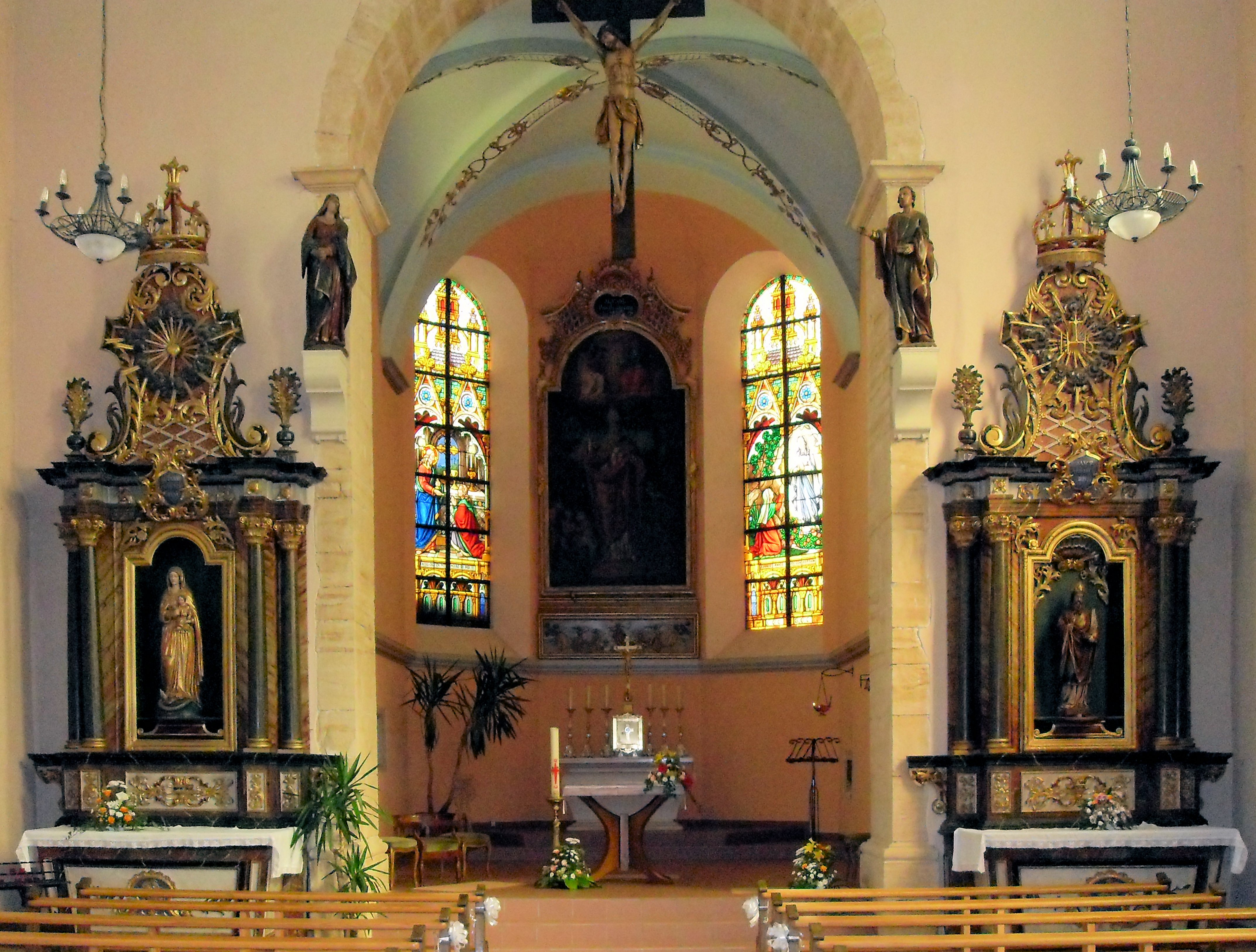 L'intérieur d'église Saint-Nicolas d'Oberentzen